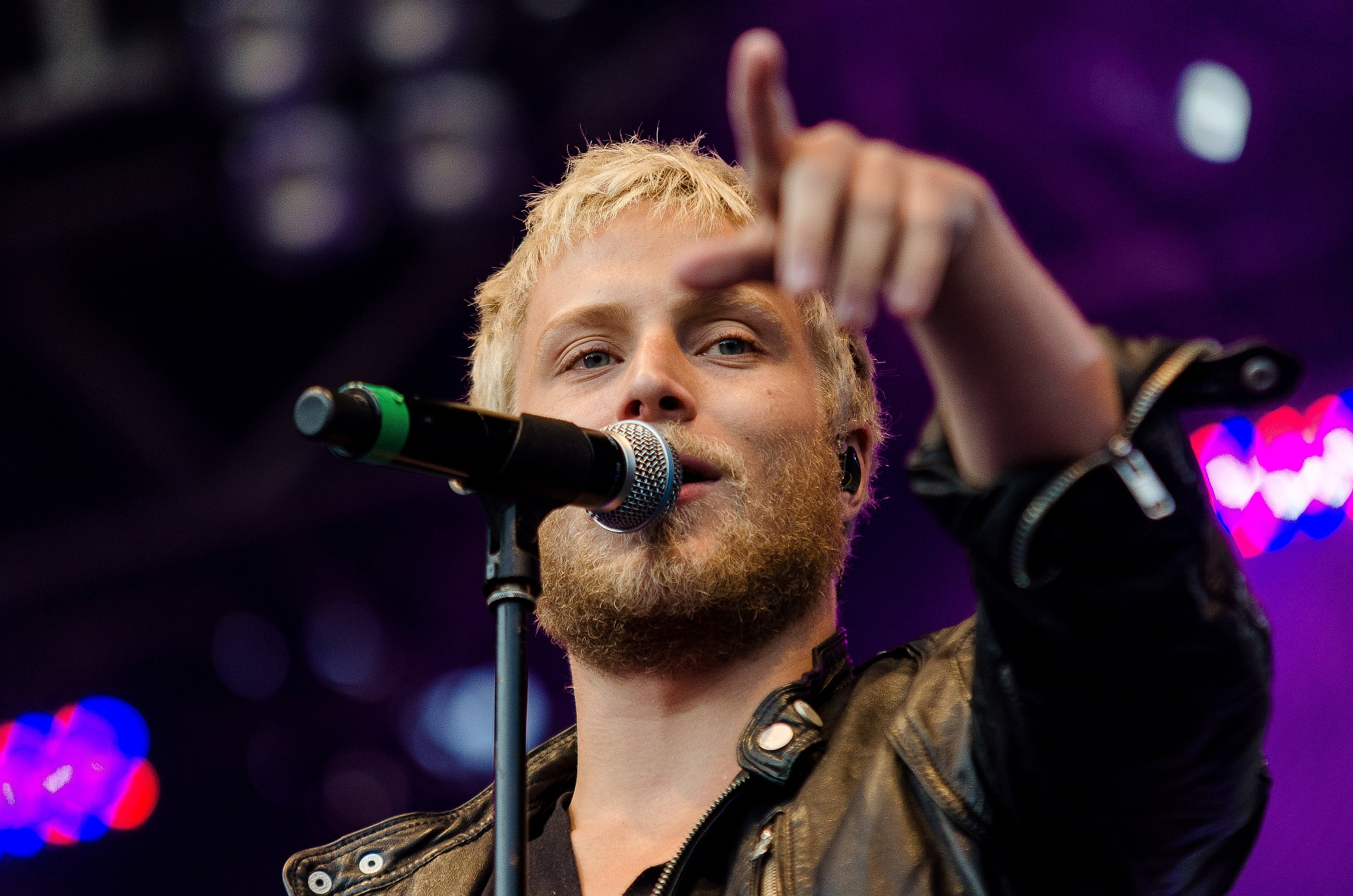 Ola uppträder på RixFM festival i Växjö, augusti 2012.